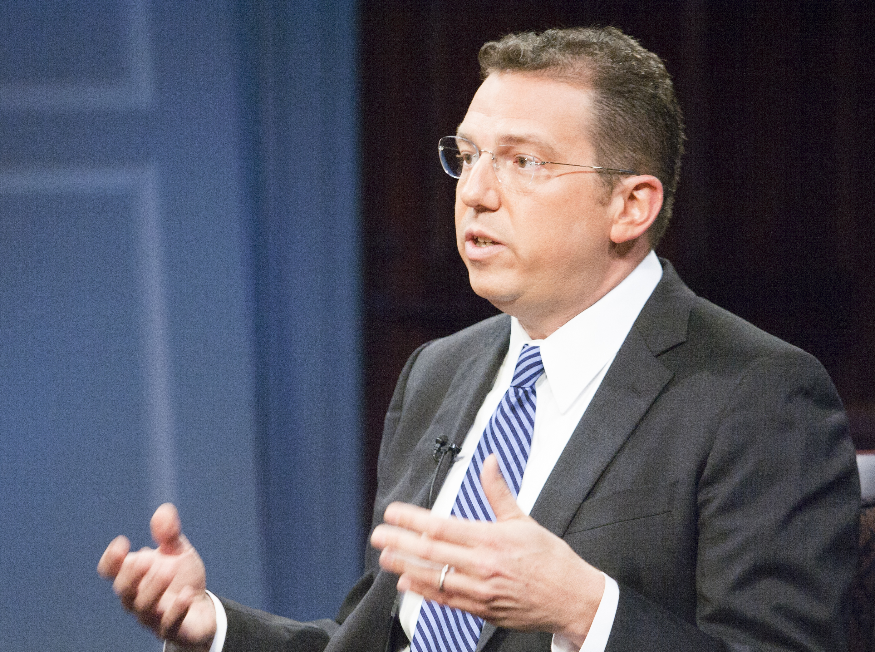 Kevin Kruse, One Nation Under God, 9/16/15